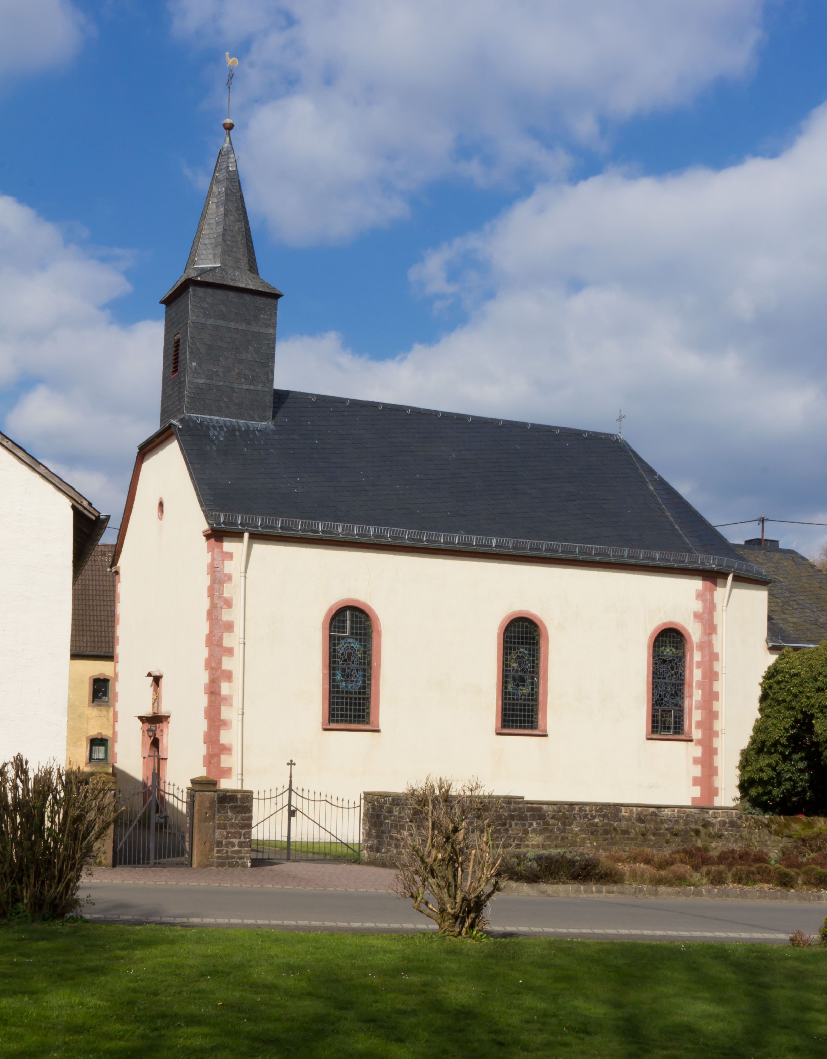 Steinborn, Katholische Filialkirche St. Hubert, Hauptstraße 4a